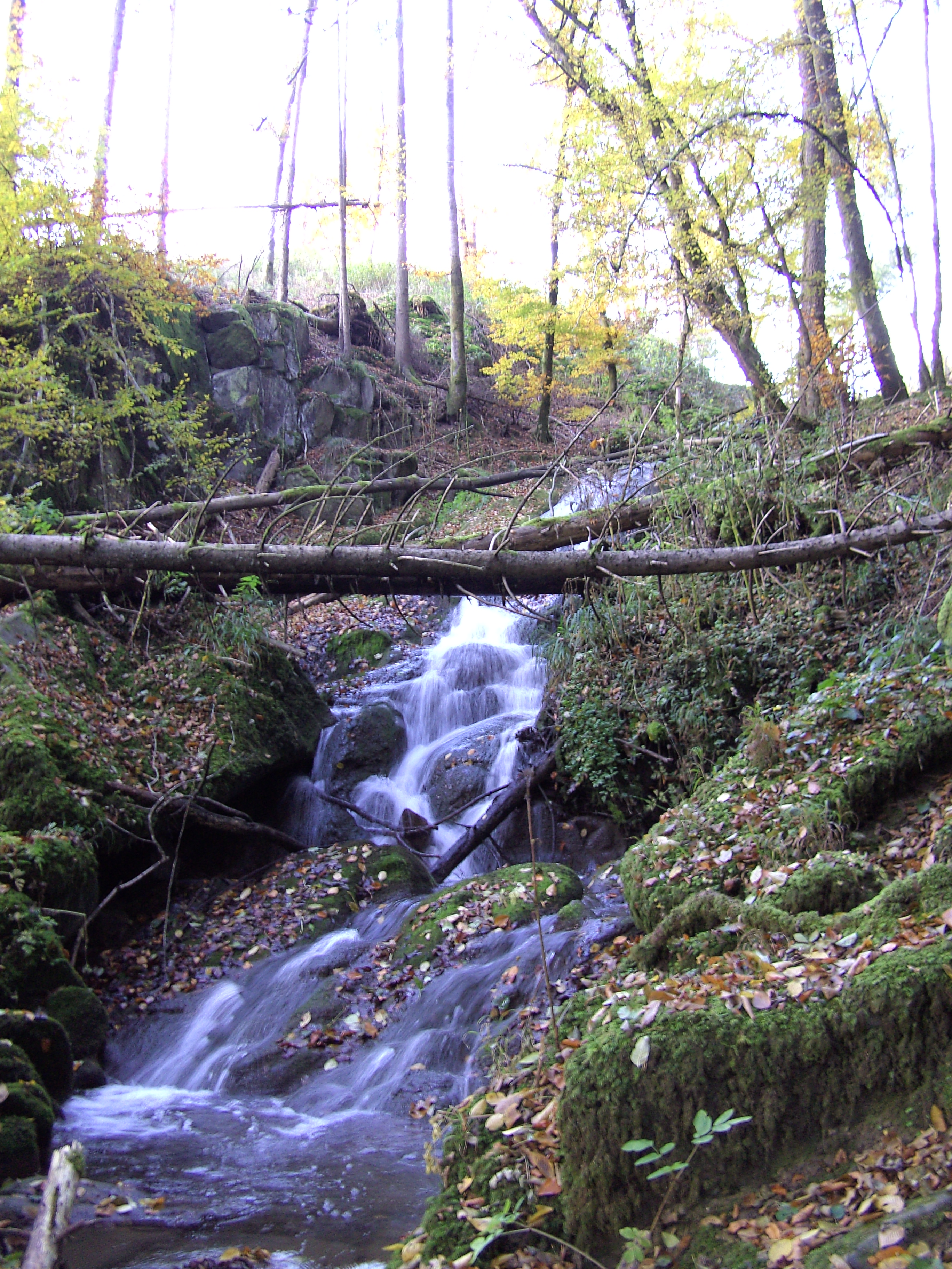 Birkinger Wasserfall Oktober 2007